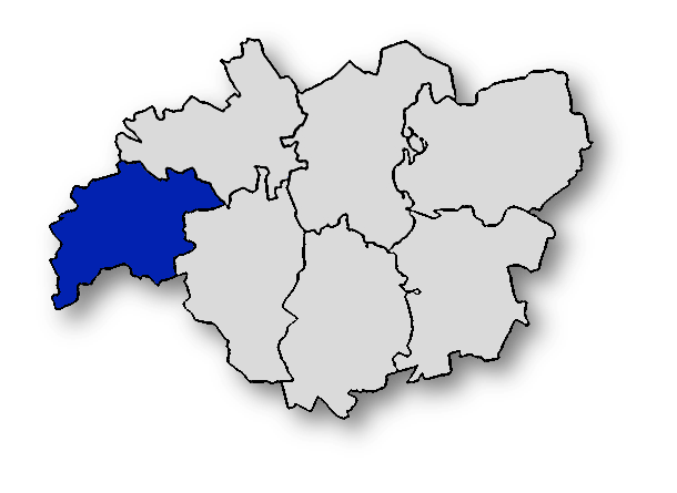 Powiat pułtuski z uwzględnieniem Gminy Świercze